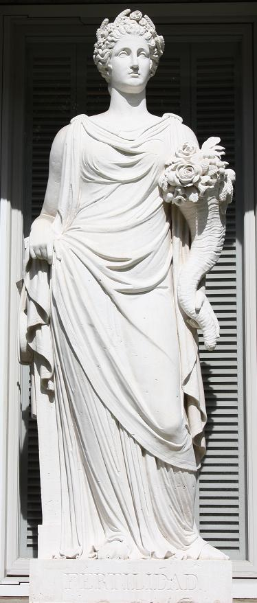 Efigie de la Diosa Ceres. Fachada principal Museo Nacional del Prado (Madrid)